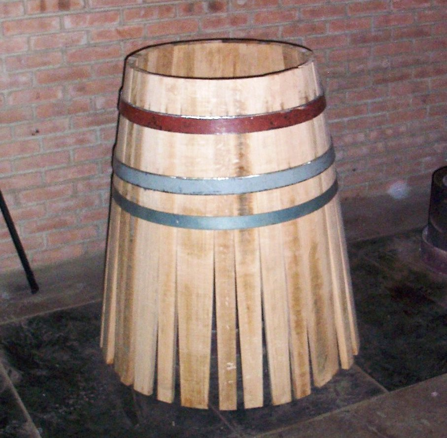 Preparación de una barrica para contener vino.